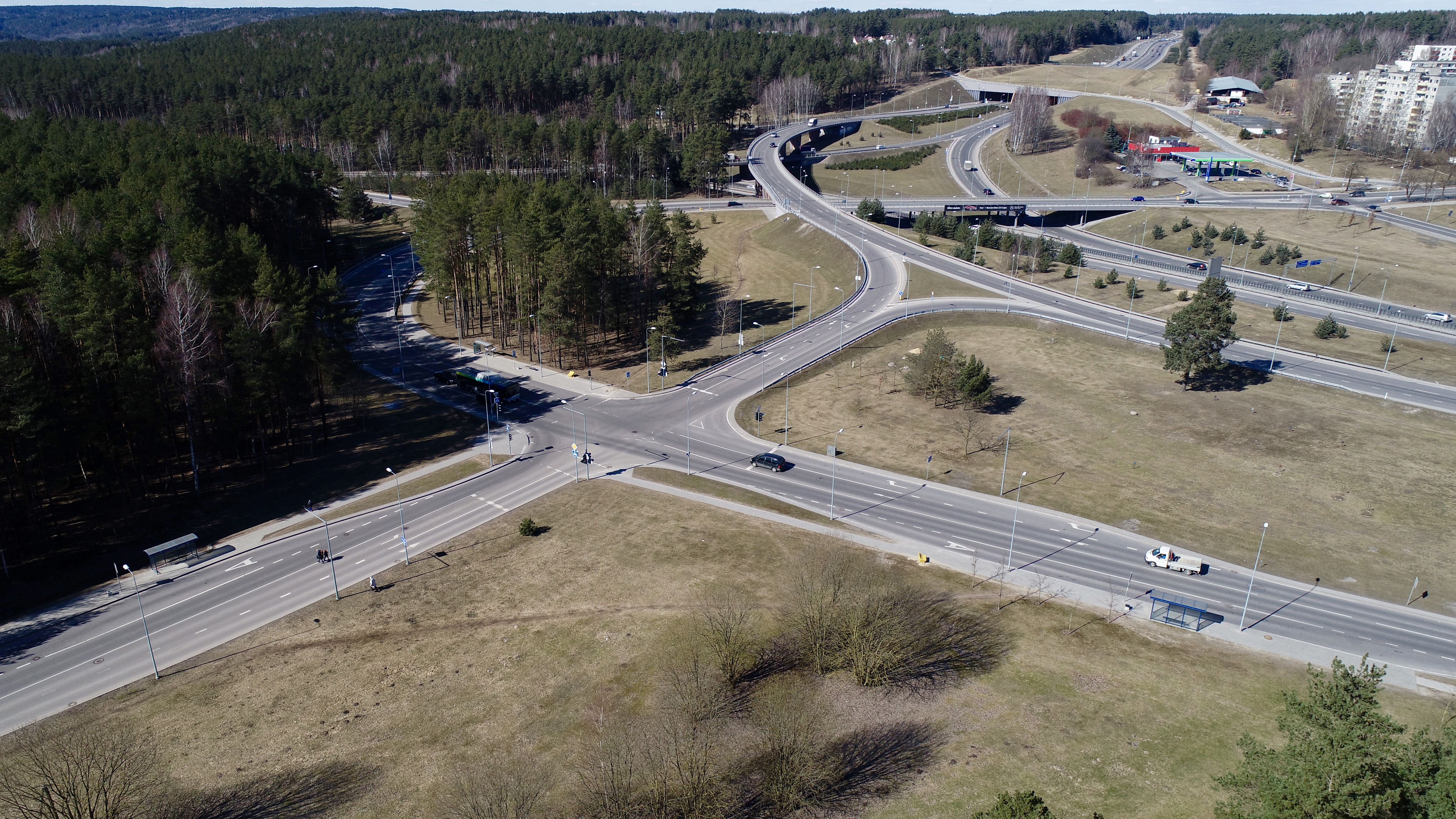 Vakarinio aplinkkelio pabaiga pietuose, Oslo gatvė ir įvažiavimas į Lazdynėlius.